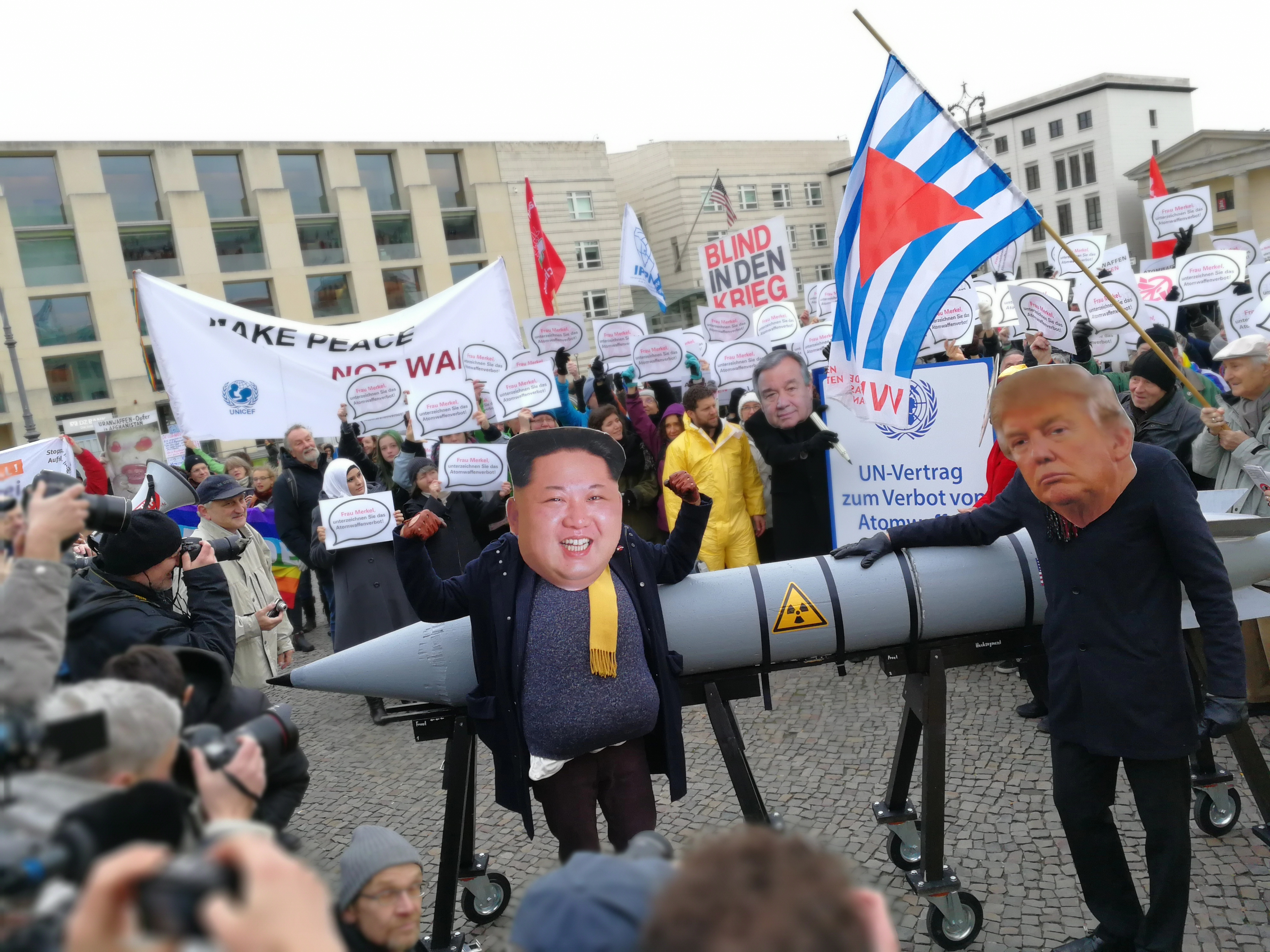 Rund 700 Menschen verbinden die Botschaften von Nordkorea und den USA in Berlin. Sie demonstrieren gegen atomare Aufrüstung und fordern von der Bundesregierung den Beitritt zum UN-Atomwaffenverbot und den Abzug der US-Atombomben in Büchel (Rheinland-Pfalz). Bei der Aktion haben als Donald Trump und Kim Jong-un verkleidete Friedensaktivisten zwei nachgebaute Atombomben in Originalgröße die Strecke entlang geschoben. Am Ende haben zwei Menschen mit Masken von Bundeskanzlerin Angela Merkel und UN-Generalsekretär António Guterres symbolisch eine Atomrakete zerstört und dann das Atomwaffenverbot unterschrieben. Berlin, 18. November 2017. Foto: Michael Schulze von Glaßer